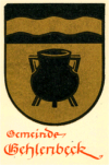 Das alte Wappen der Gemeinde Gehlenbeck. Beschreibung: In goldenem Schilde ein schwarzer Topf unter schwarzem mit einem goldenen Wellenbalken belegten Schildhaupt. Verleihung des Wappens: 29. September 1938